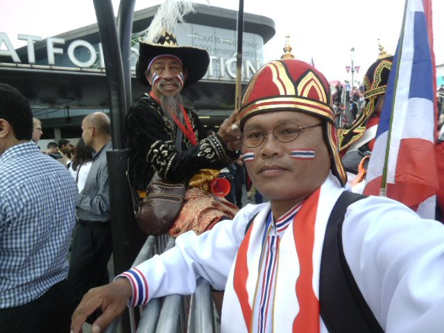 THAILAND CHEERLEADER